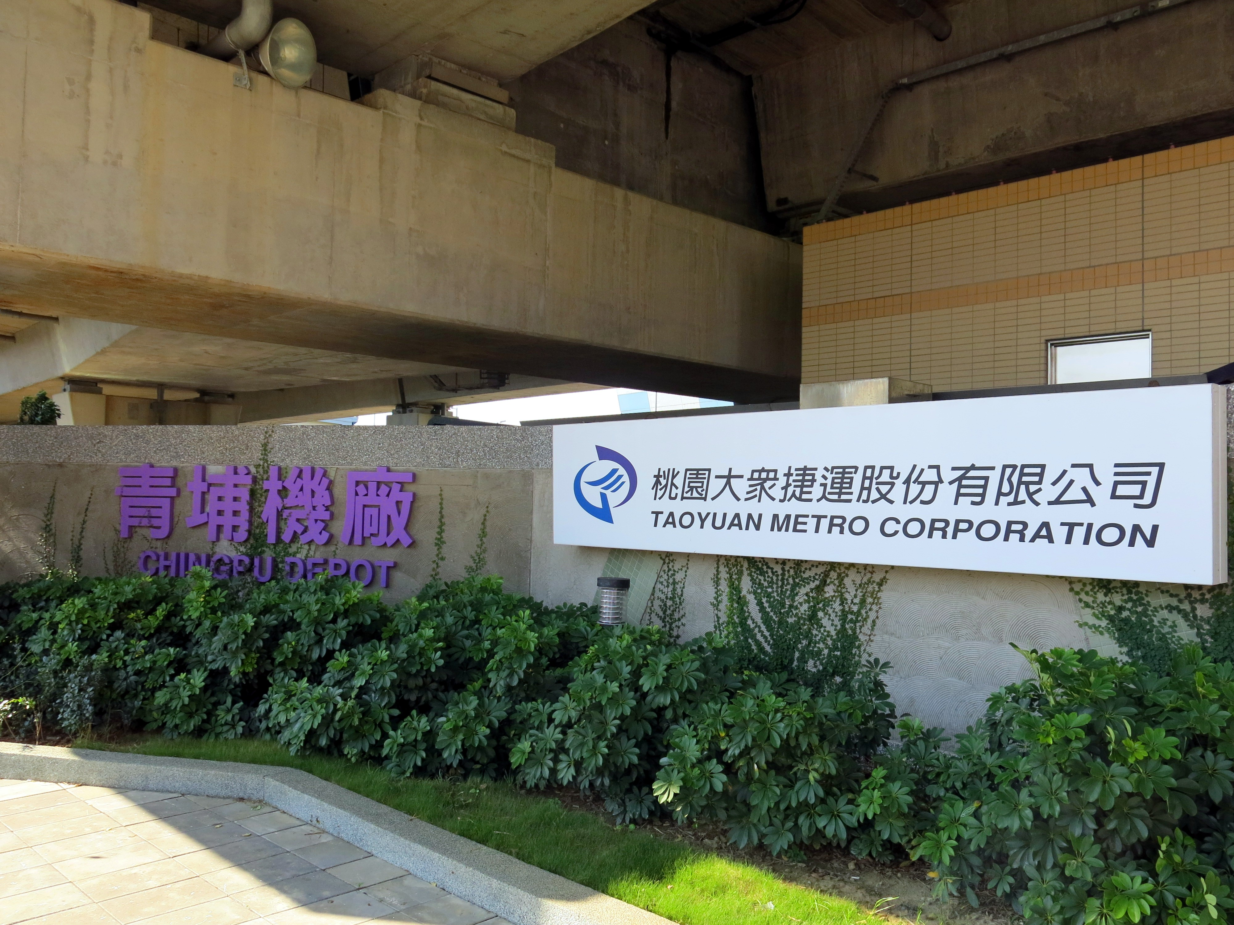 中文（台灣）: 桃園捷運機場線青埔機廠